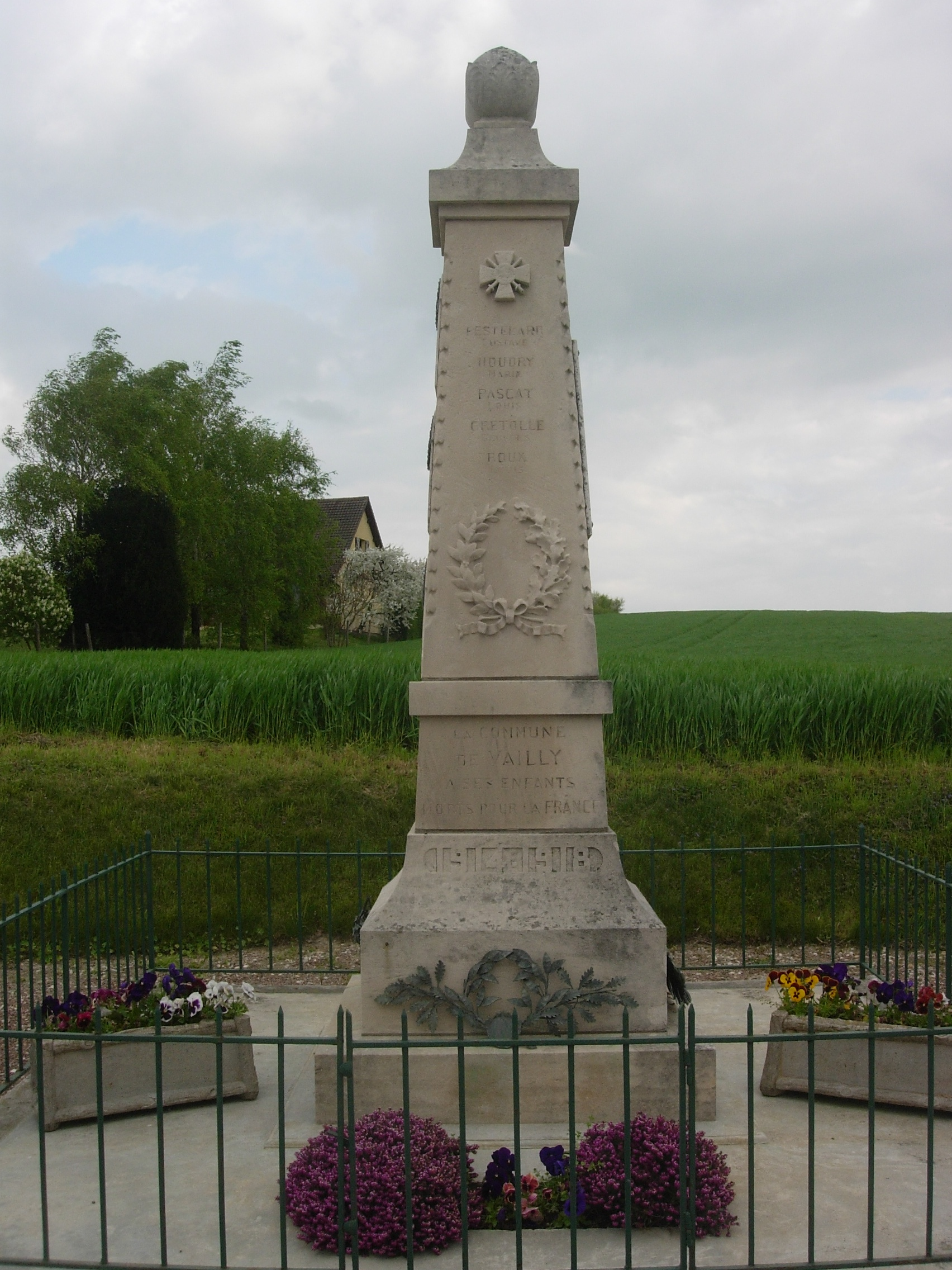 Vailly (Aube)